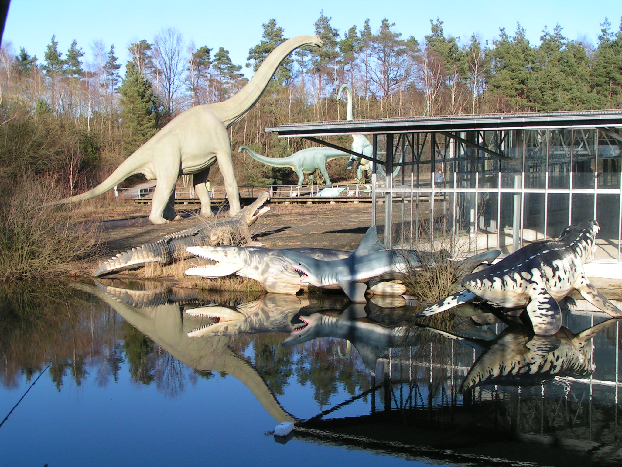 Dinosauriermodelle im Saurierpark Münchehagen, rechts im Bild Ausstellungshalle Saurierfährten Münchehagen